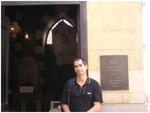 אפרים לב באתר היסטורי